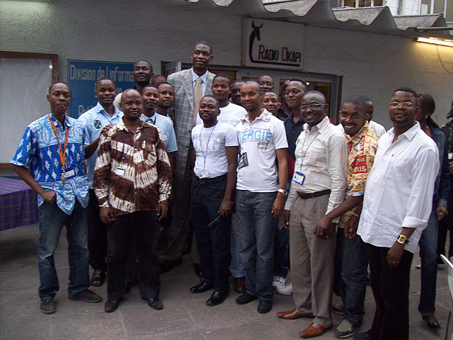 Les amis de Radio Okapi et le basketteur Mutombo Dikembe